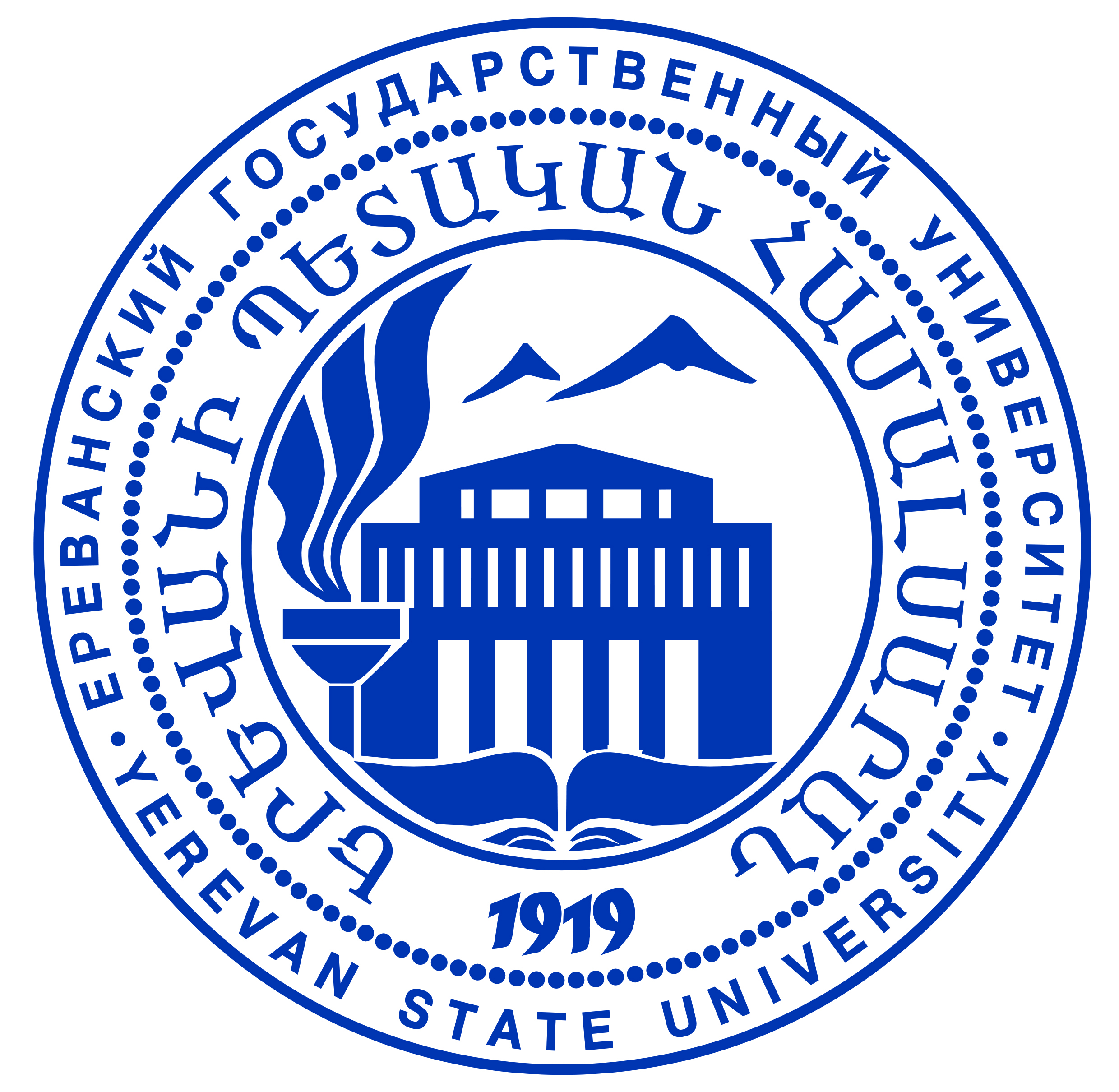 Երևանի պետական համալսարանի գերբը